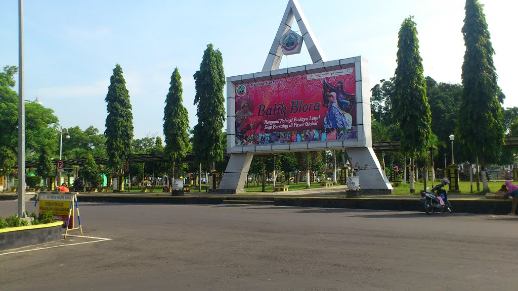 Alun Alun Kota Blora